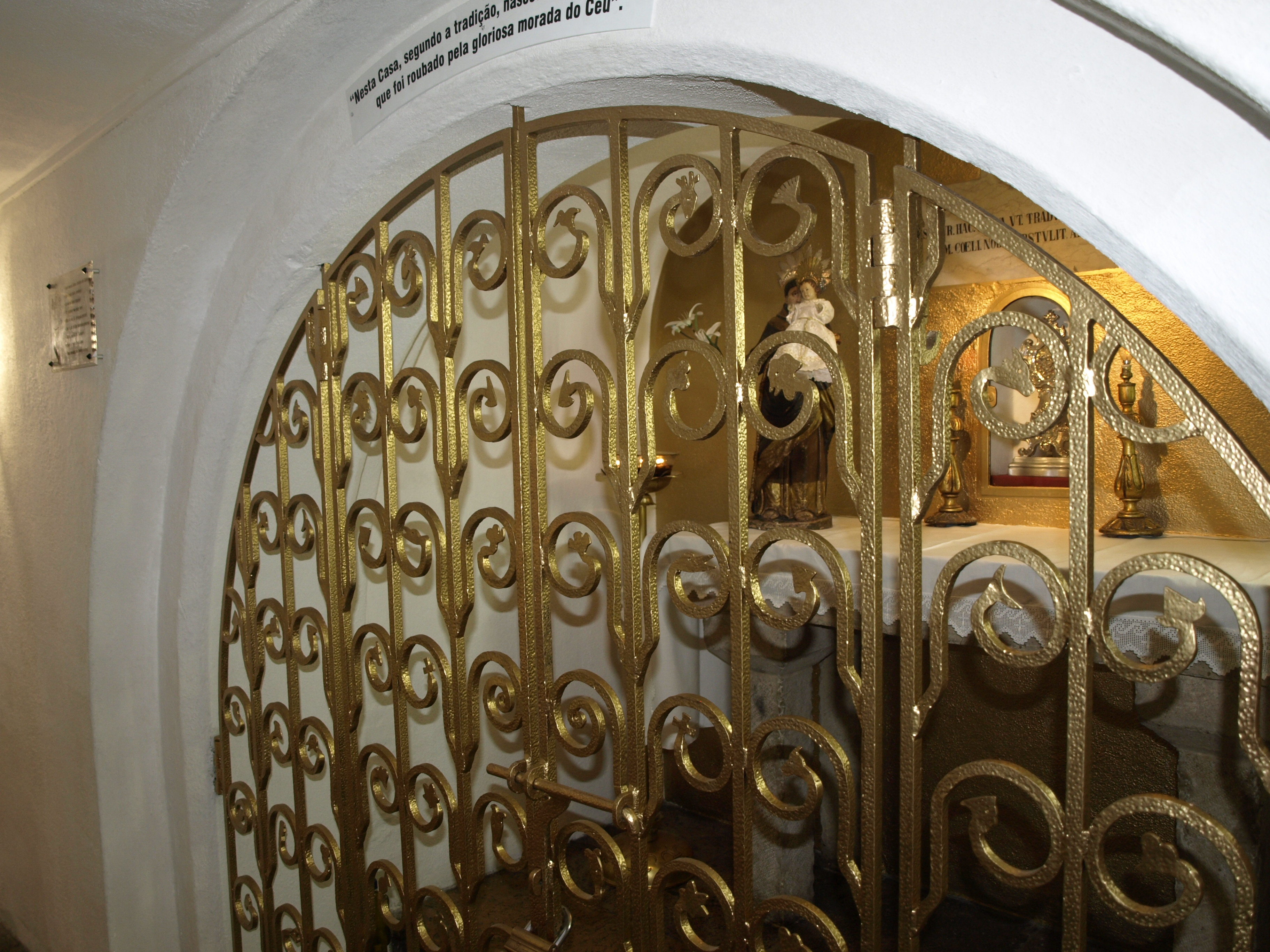 la casa natale di S. Antonio da Padova